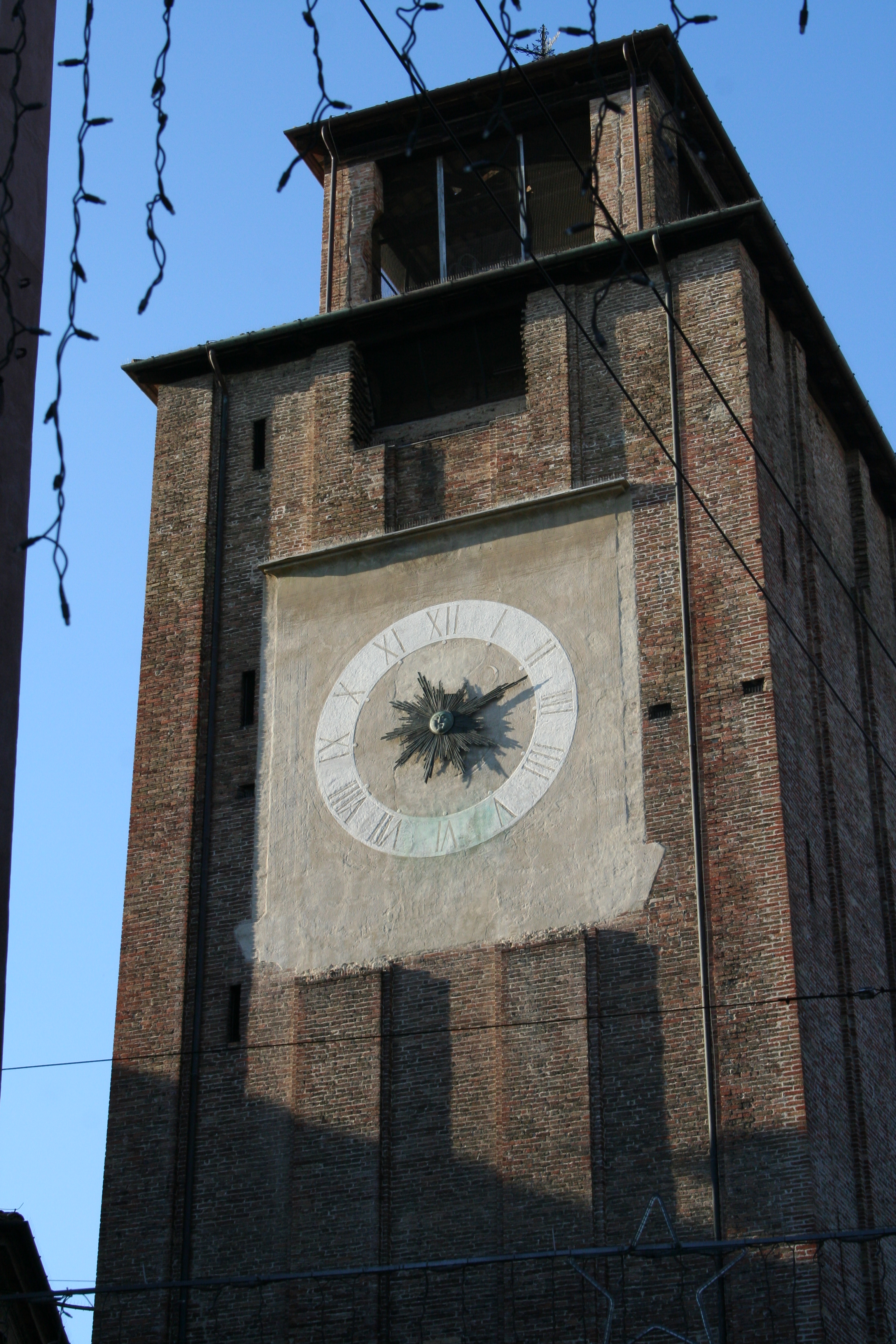 Campanile del Duomo di Treviso